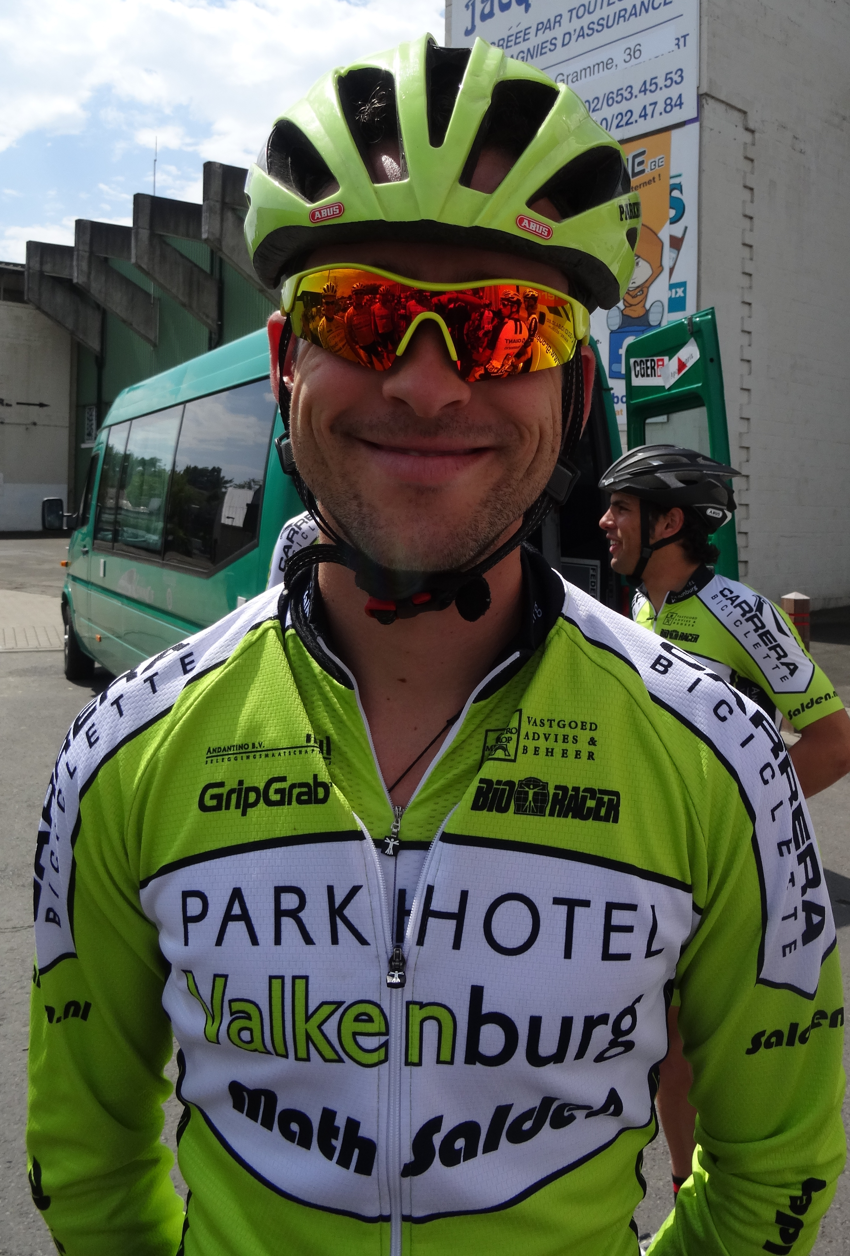 Reportage réalisé le dimanche 8 juin à l'occasion du départ du Mémorial Philippe Van Coningsloo 2014 à Wavre, Belgique.